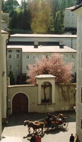 Tor des Franziskanerklosters Salzburg